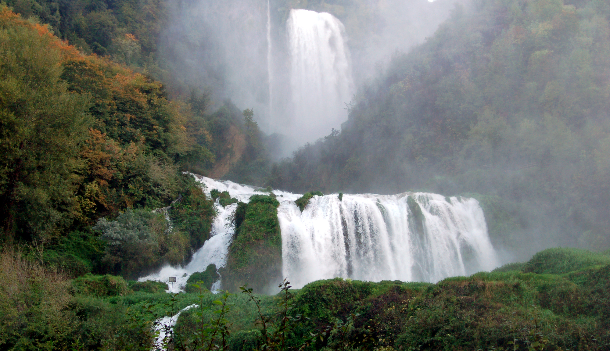 best view large